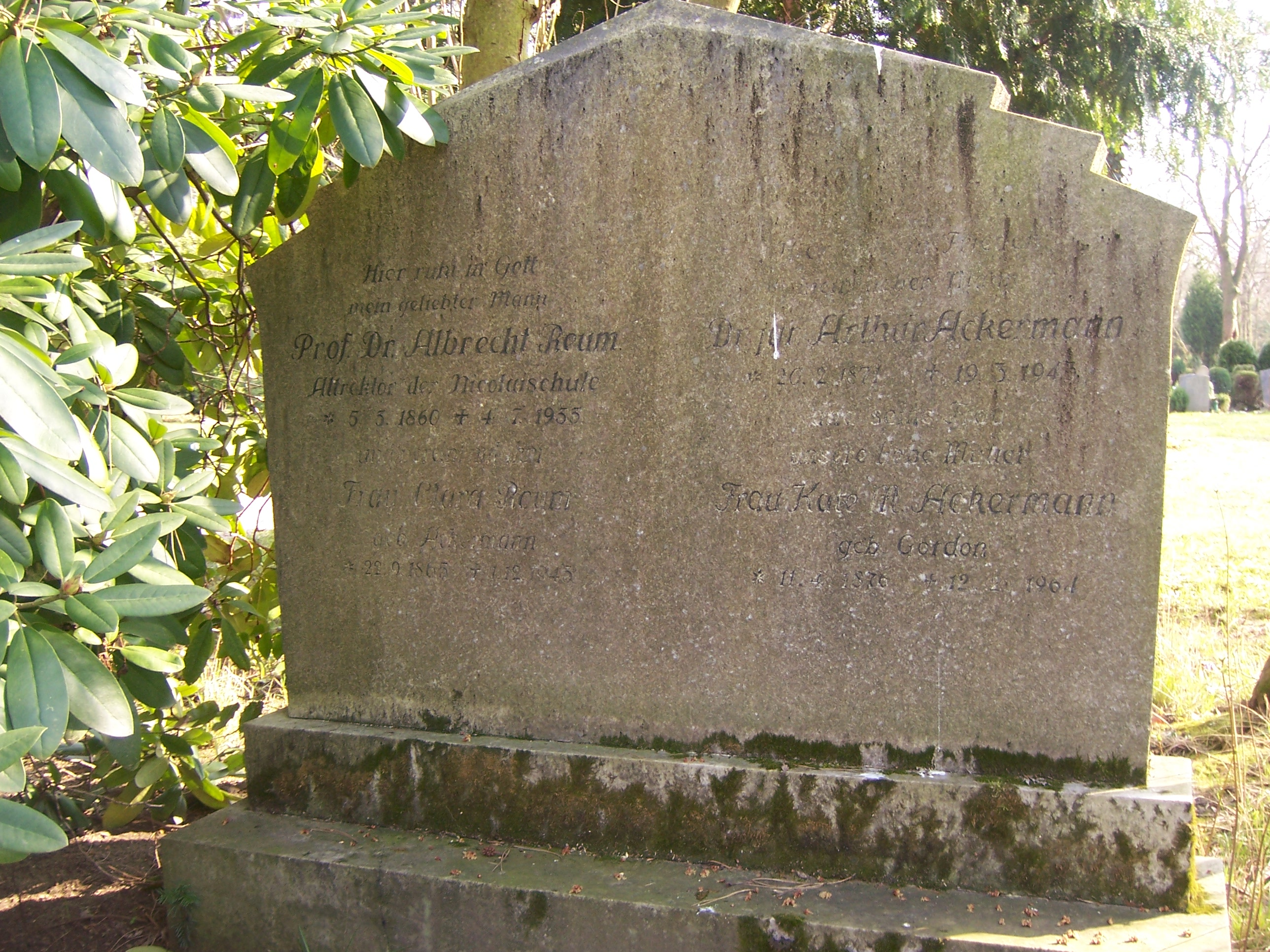 Grabstätte Prof. Dr. Albrecht Reum (*5. März 1860; + 4. Juli 1933) Direktor der Nikolaischule in Leipzig